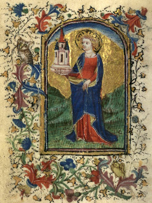 Feuillet 231, verso. Heures de Toul (atelier messin). Velin. (Metz, deuxième quart du XVe siècle).